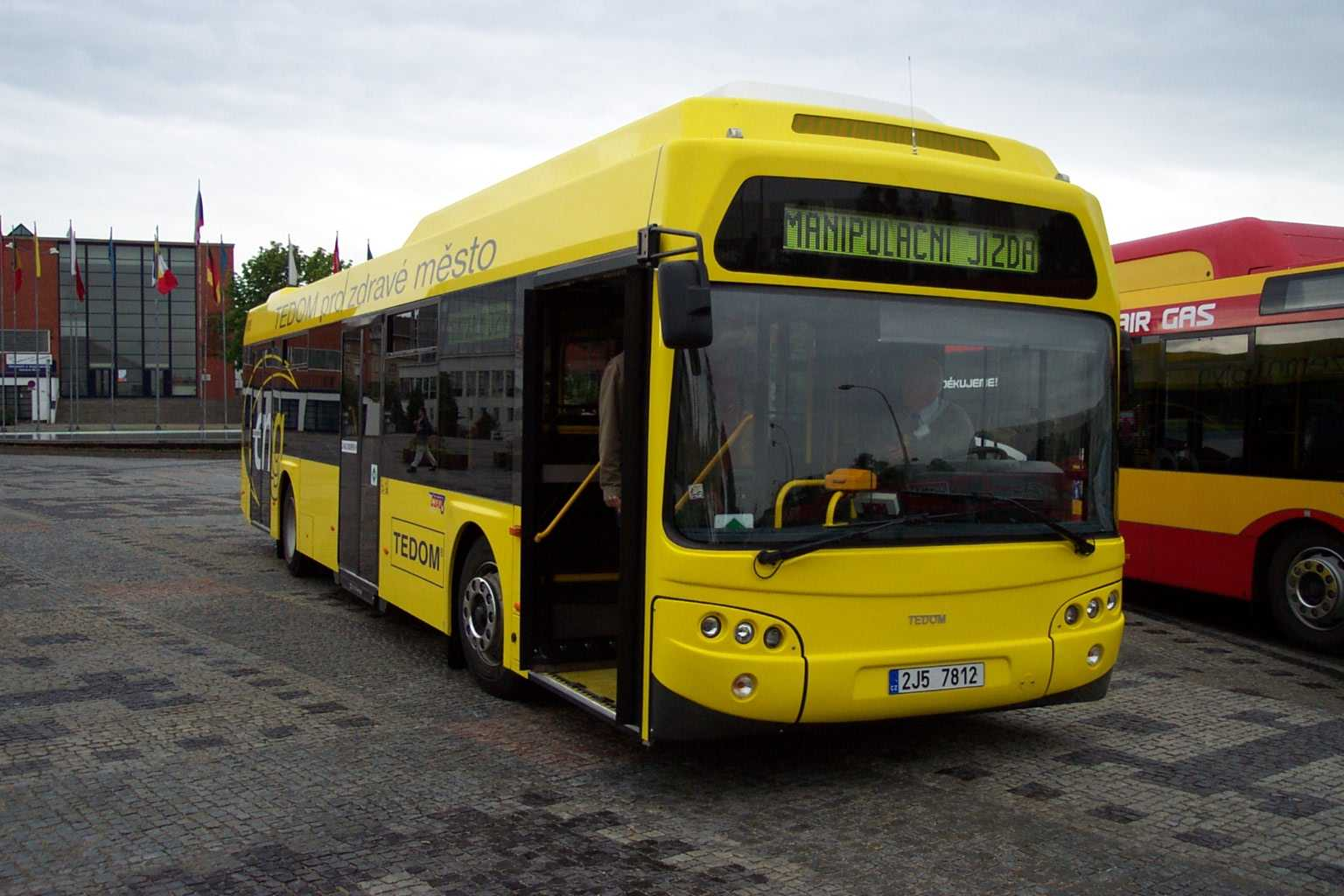 TEDOM bus at Autotec trade fair in Brno - Autobus typu TEDOM na veletrhu Autotec v Brně